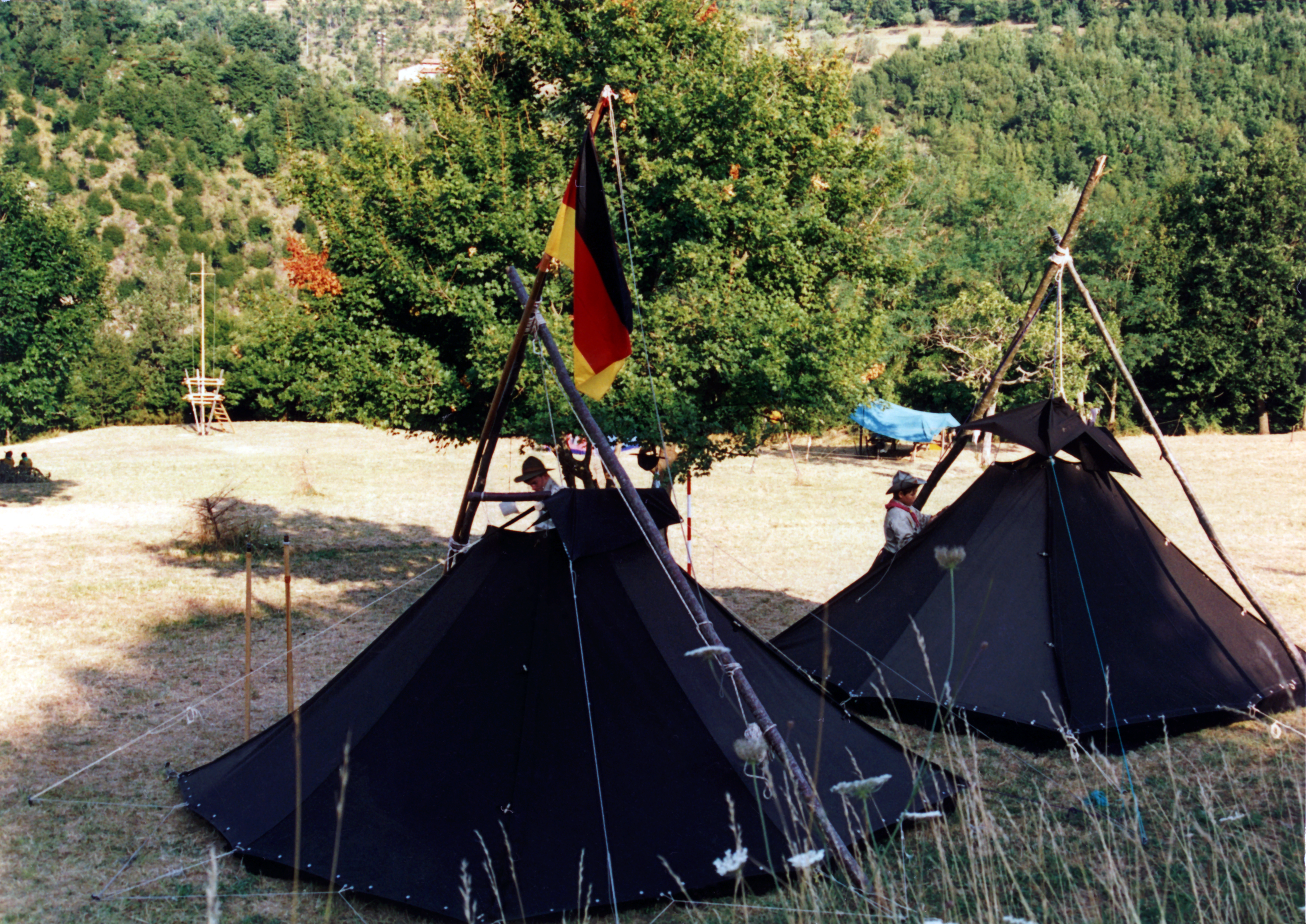 Internationales Sommerlager „Interexplo Italia ’93 – The Spirit of B.P.”, das vom 09.08. bis 22.08.1993 auf dem Gelände der Associazione Guide e Scouts Cattolici Italiani (AGESCI) „Padre Ugo Berruto“ der Gruppen La Spezia 2 und 5 bei Arlia/Fivizzano, Toscana, stattfand. Organisiert hatten das Lager die Pfadfinder des Stammes Ägypten, Trupp Penzberg der Katholischen Pfadfinderschaft Europas (KPE) sowie AGESCI-Pfadfinder der Gruppe 5 aus La Spezia. Als weitere Gäste wurden die Pfadfinder der mit den Penzbergern befreundeten 73. Abteilung „Weißer Hirsch“ des ungarischen Magyar Cserkészszövetség (MCSSZ) aus Tapolca eingeladen. Im Bild: Morgendlicher Blick über den Lagerplatz mit zwei Kohten der deutschen Teilnehmer aus dem Stamm Ägypten. Das Schwarzzeltmaterial war bei Klaus Wiese Ausrüstungen, Schönkirchen bei Kiel erworben worden und stammte noch aus deutscher Produktion von der Firma Stromeyer.